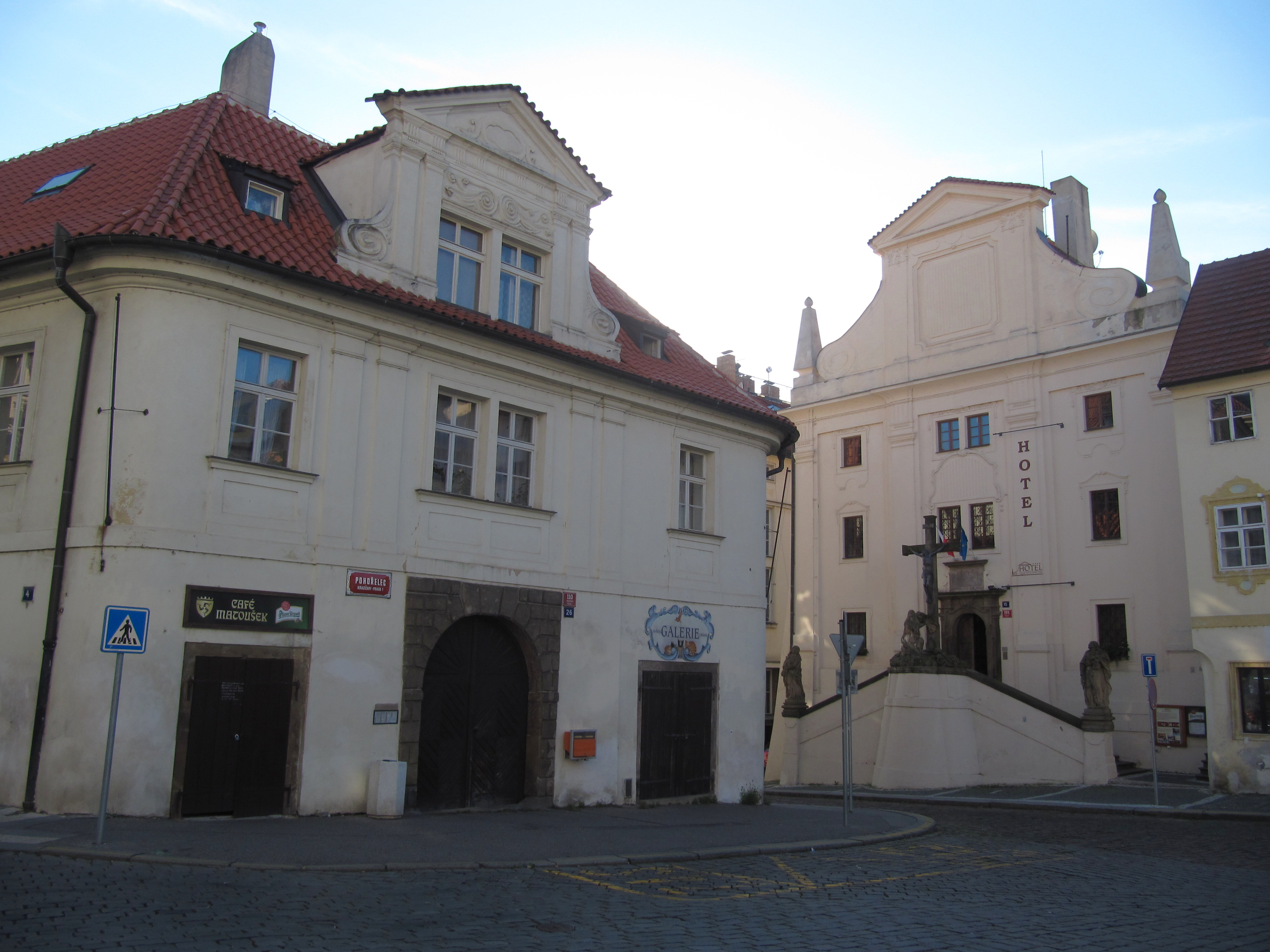 Trčkovský palác, Loretánské náměstí 110/4, Pohořelec 110/26, Úvoz 110/44, Hradčany. Hotel Questenberk (bývalý špitál svaté Alžběty).